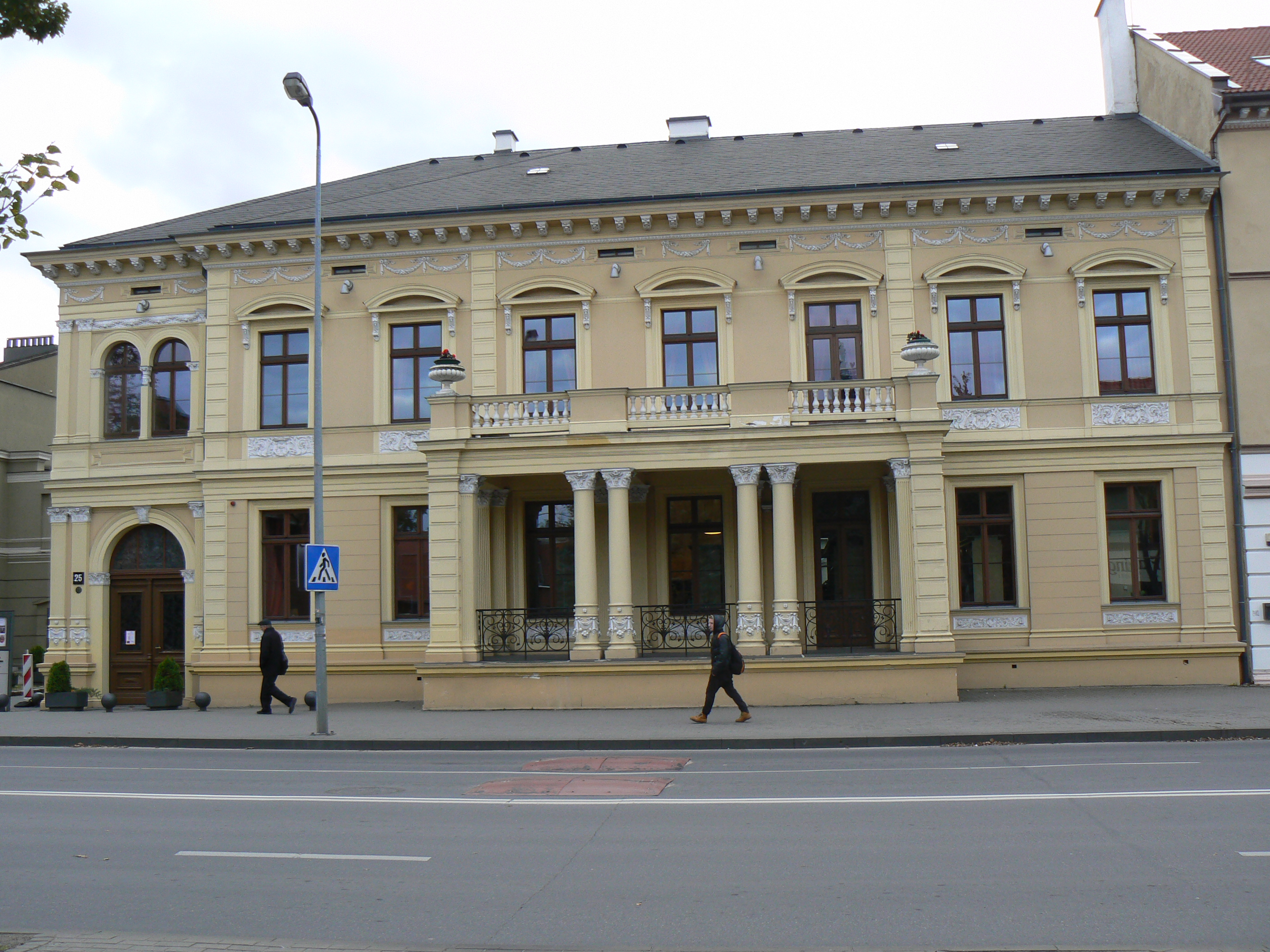 Knihovna Ievy Simonaitytė v ulici Herkaus Manto gatvė v Klaipėdě. Pohled od východuLietuvių: Ievos Simonaitytės biblioteka Herkaus Manto gatvėje Klaipėdoje